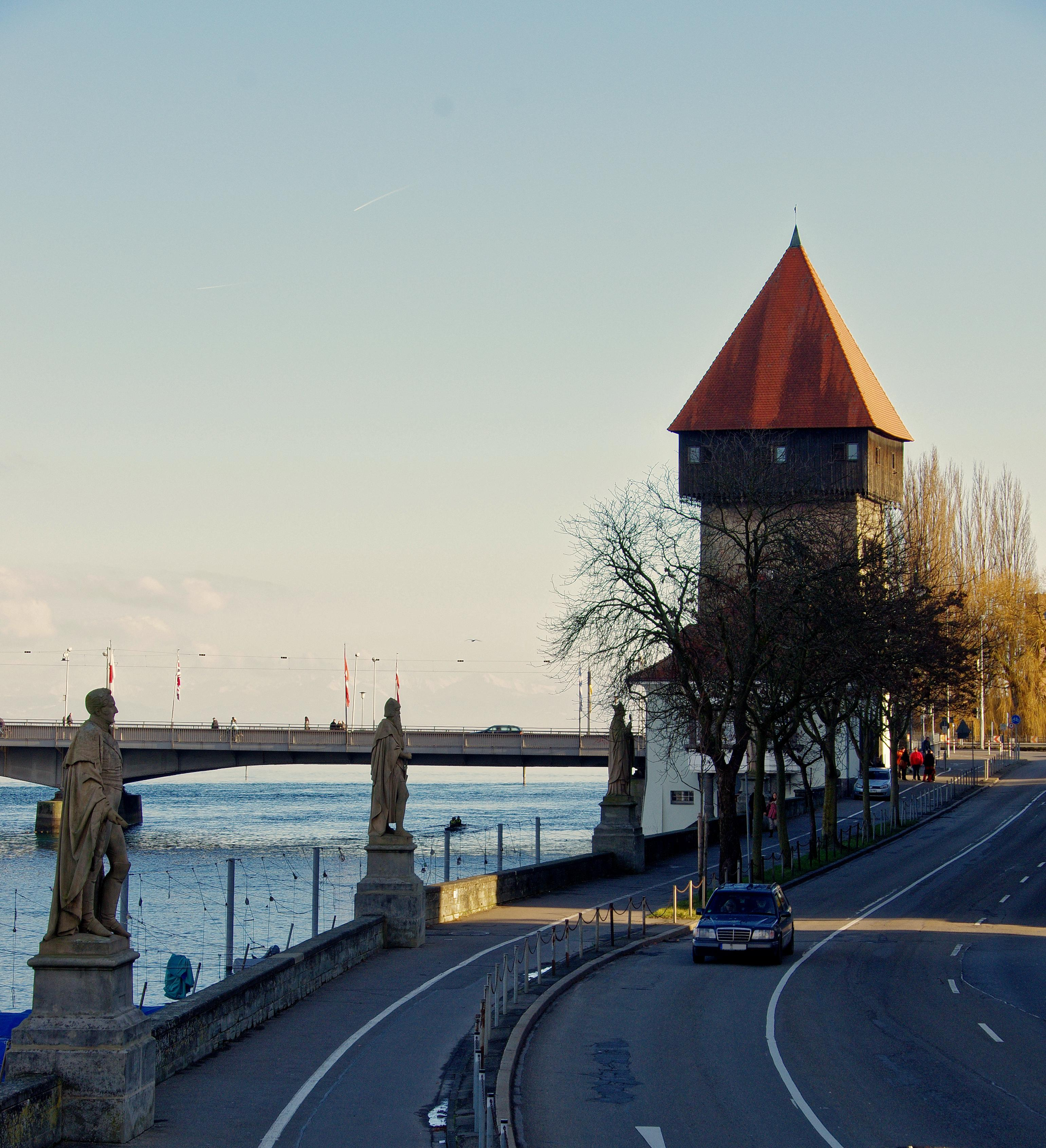 Der Rheintorturm vom Pukverturm aus mit den 4 Figuren an der Uferbefestigung